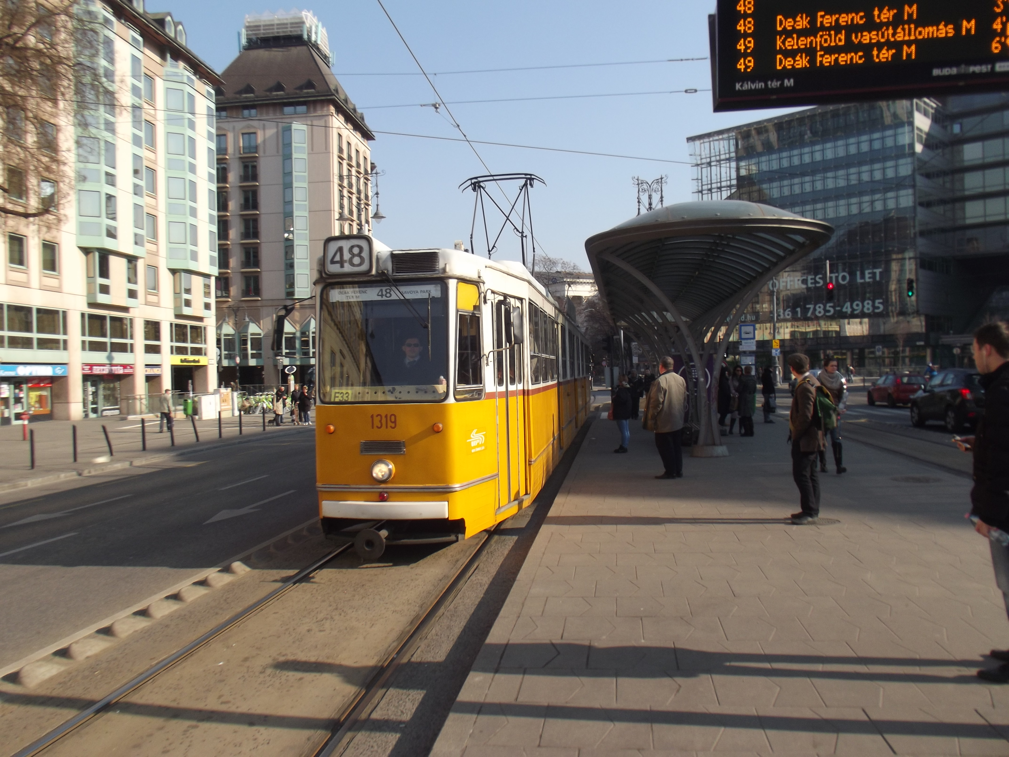 Tram 48 in het centrum van Budapest